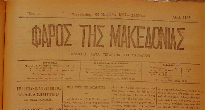 Главата на вестник Фарос тис Македонияс.